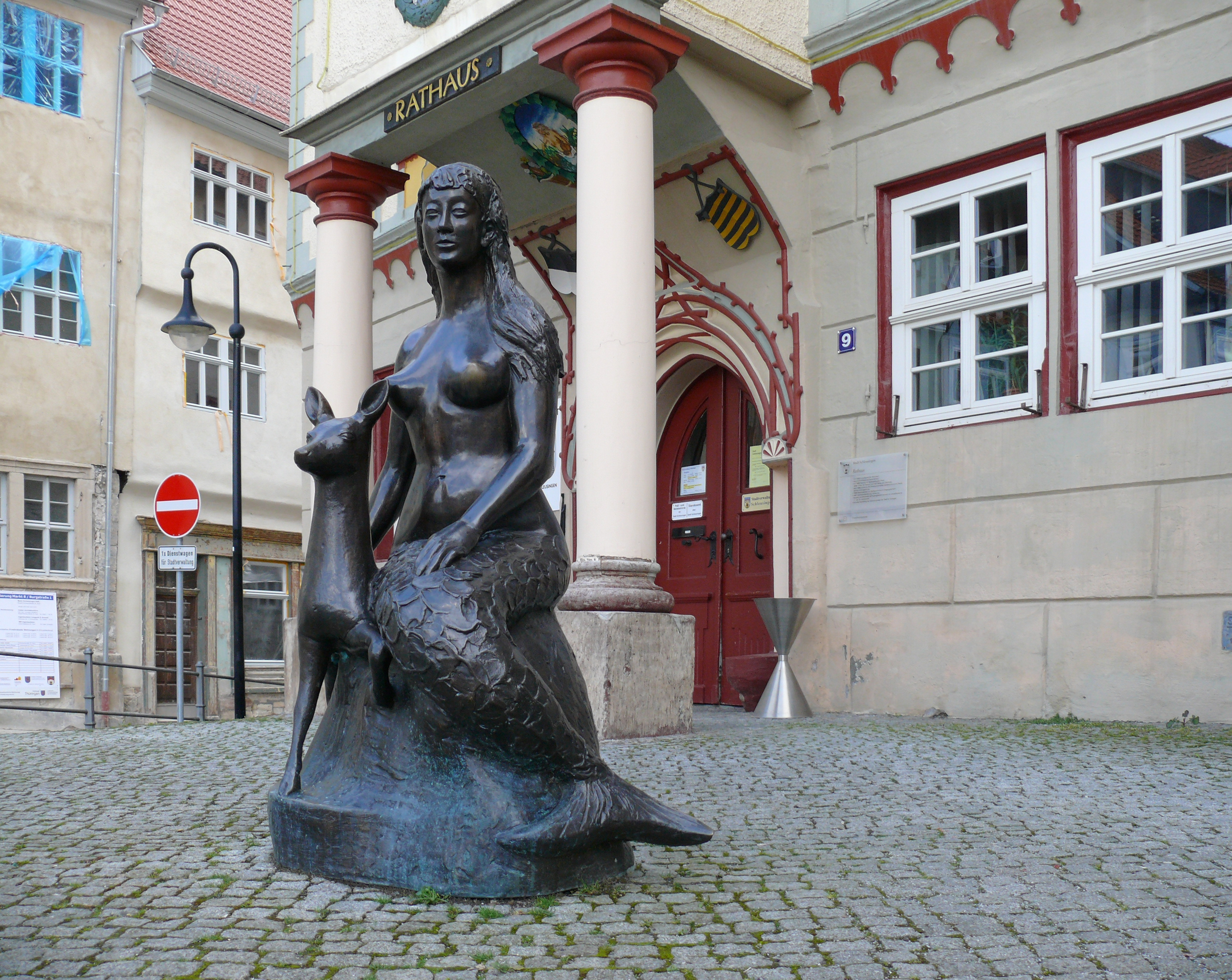 Die Nixe Slusia vor dem Schleusinger Rathaus. Der Sage nach begründete sie den Ursprung Schleusingens.